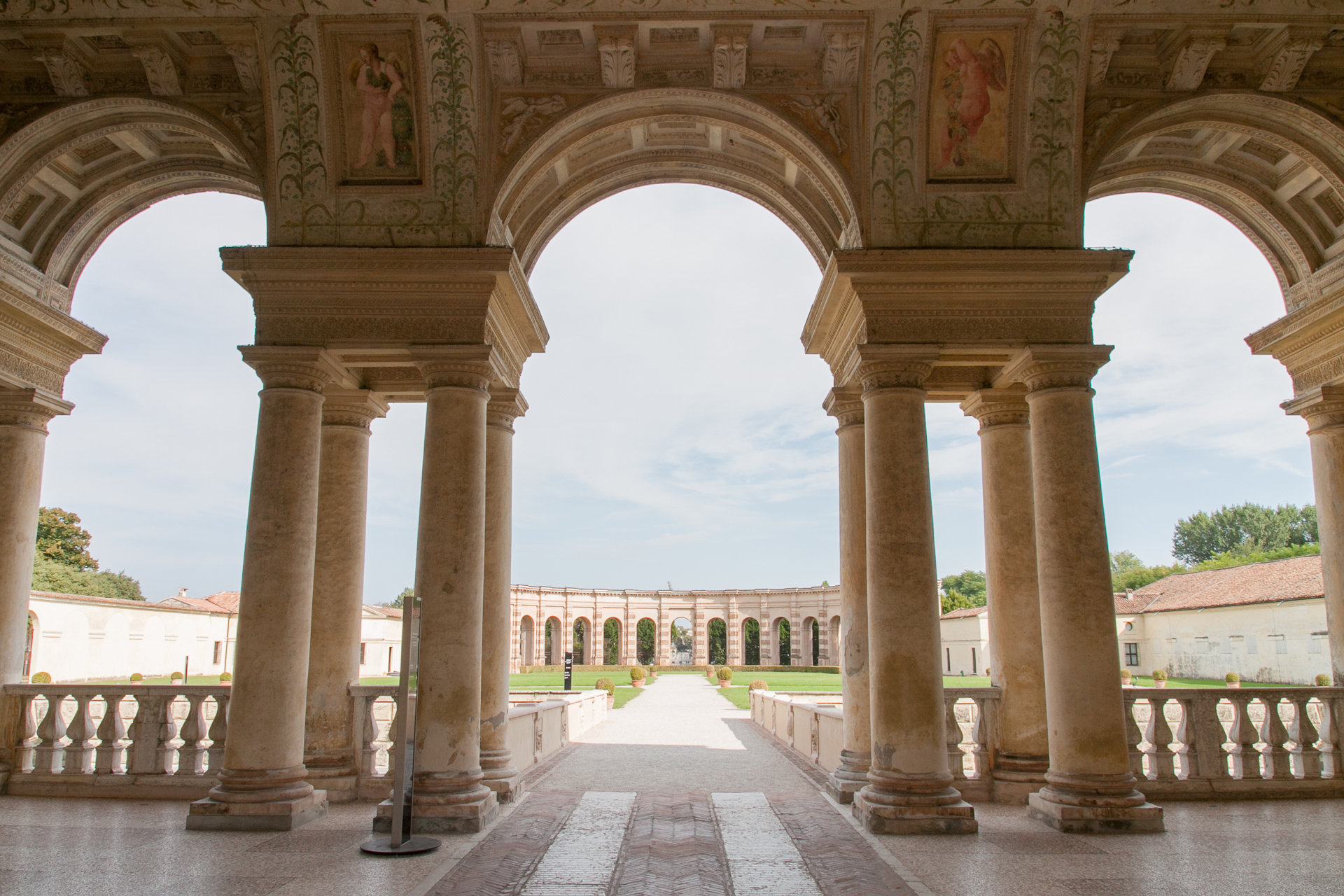 Palazzo Te: la serliana della Loggia d'onore e sullo sfondo l'emiciclo dell'esedra